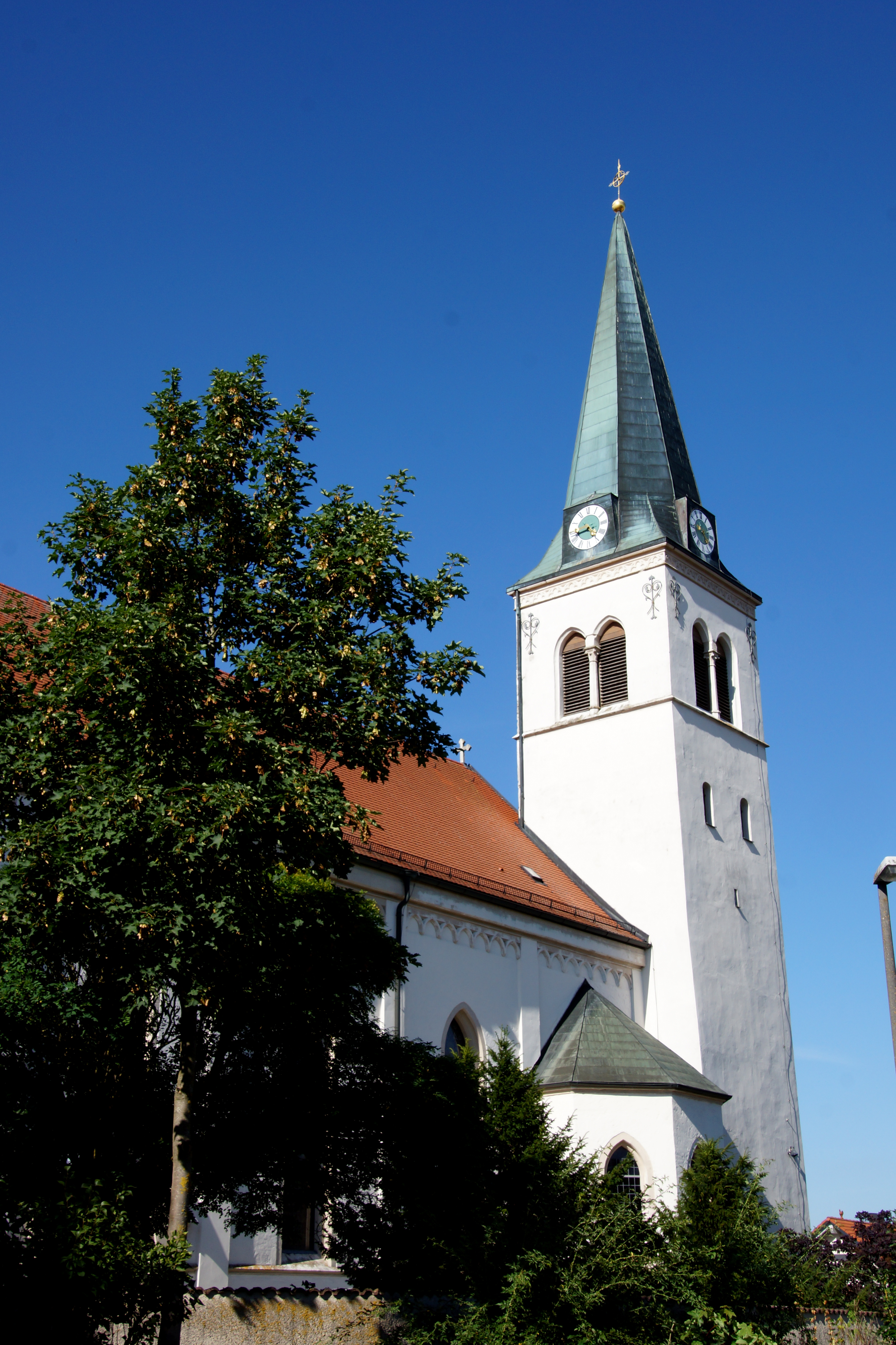 Die katholische Pfarr- und Wallfahrtskirche St. Blasius in Raitenbuch